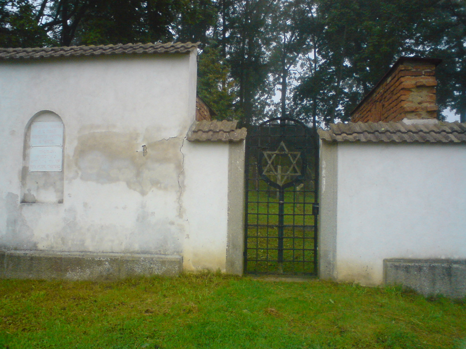 Polná - židovský hřbitov, vstupní brána.